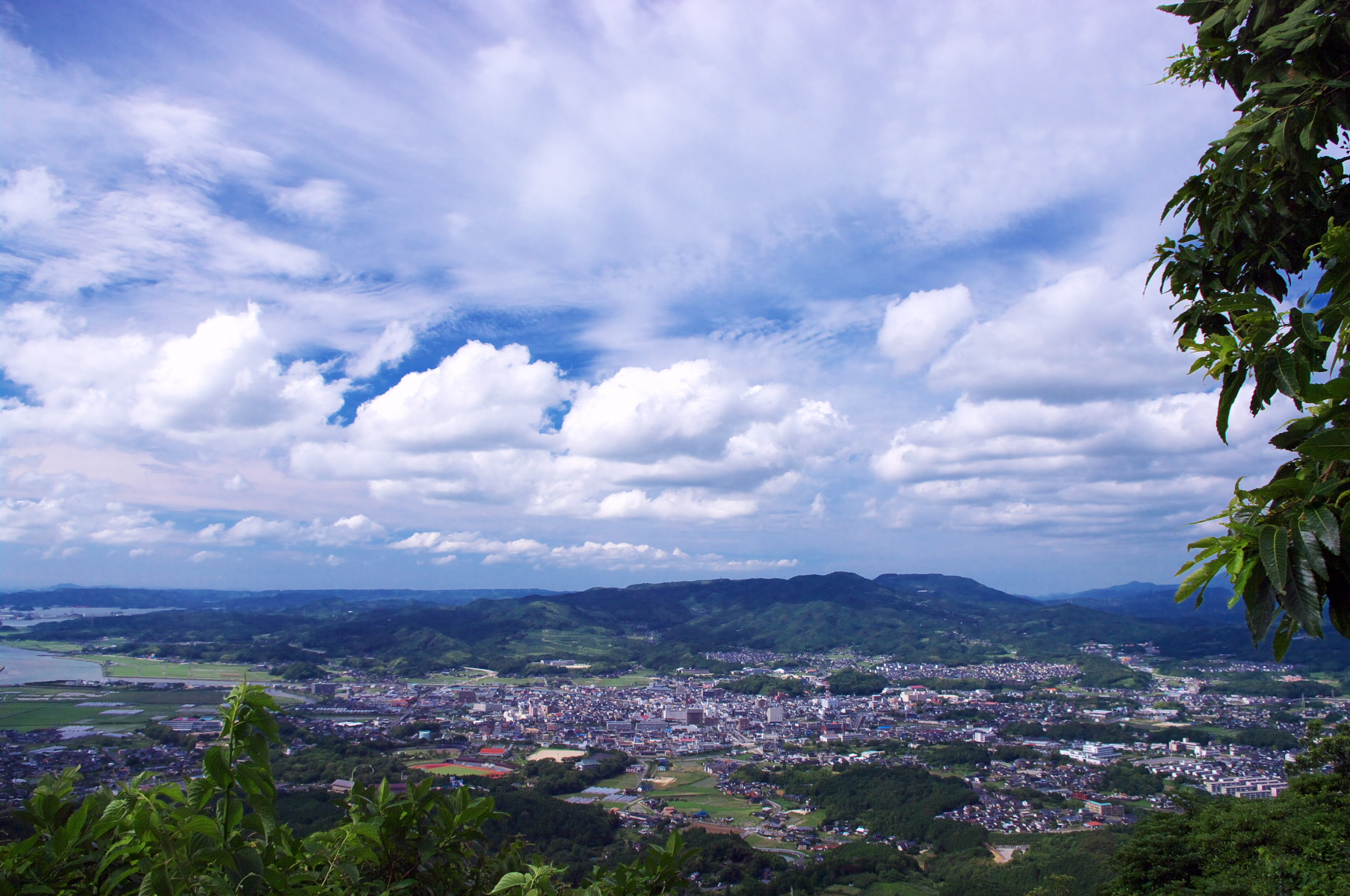 腰岳より伊万里市街地